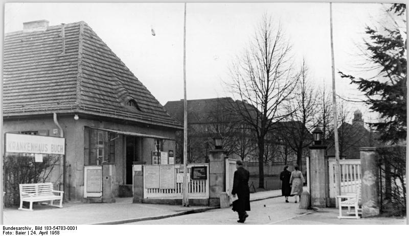 Berlin, Städtisches Krankenhaus, Eingang Zentralbild Baier Quaschinsky-Ho. 24.4.1958 Berlin, Deutschlands Hauptstadt Im Ortsteil Berlin-Buch, im Norden der Stadt, sind ein grosser Teil der Krankenhäuser konzentriert. UBz: Der Eingang zum Städtischen Krankenhaus.